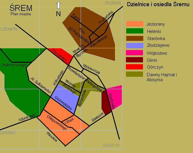 Śrem, plan miasta z podziałem na osiedla i dzielnice.